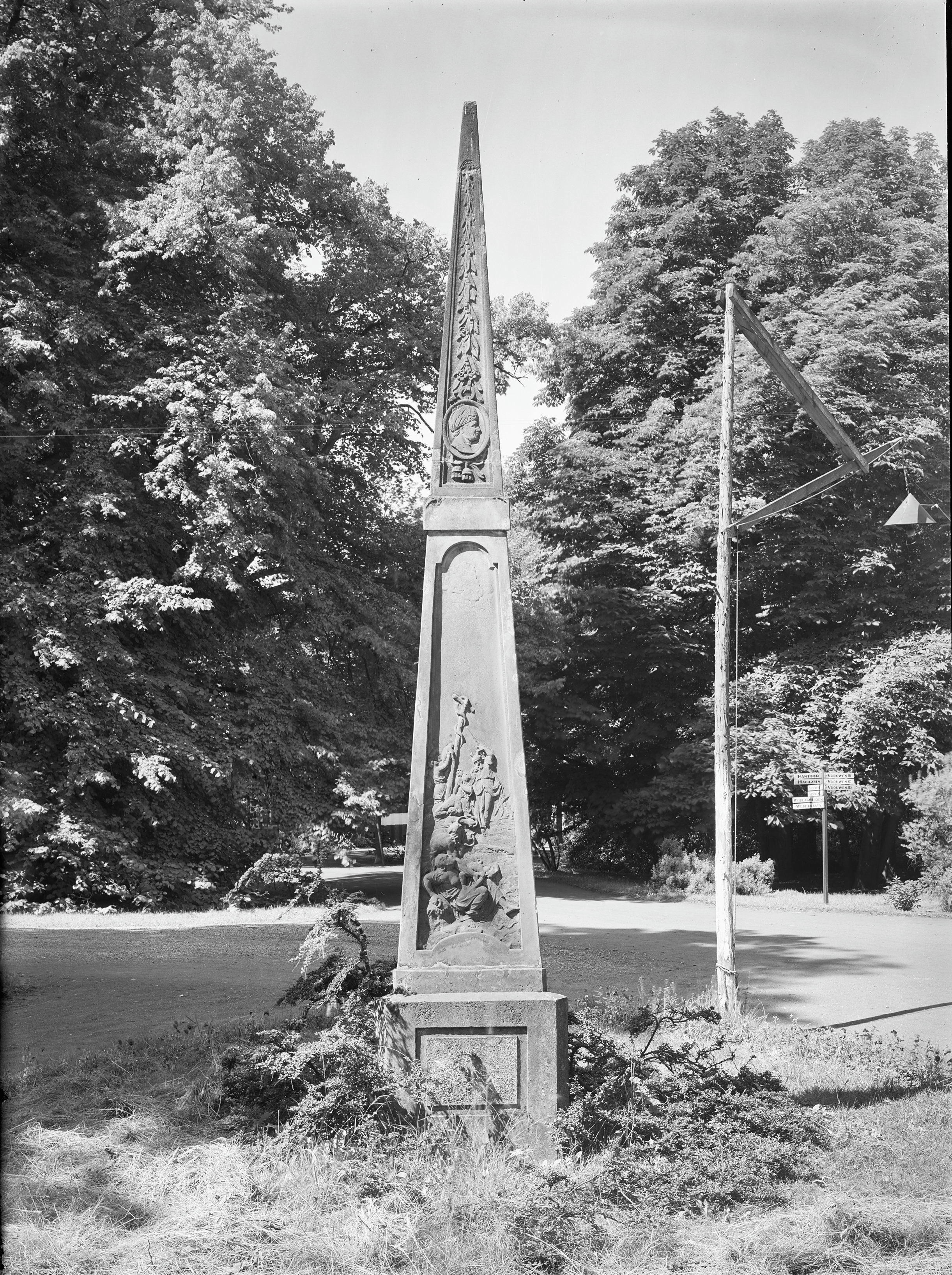 Huis Endegeest: tuinnaald